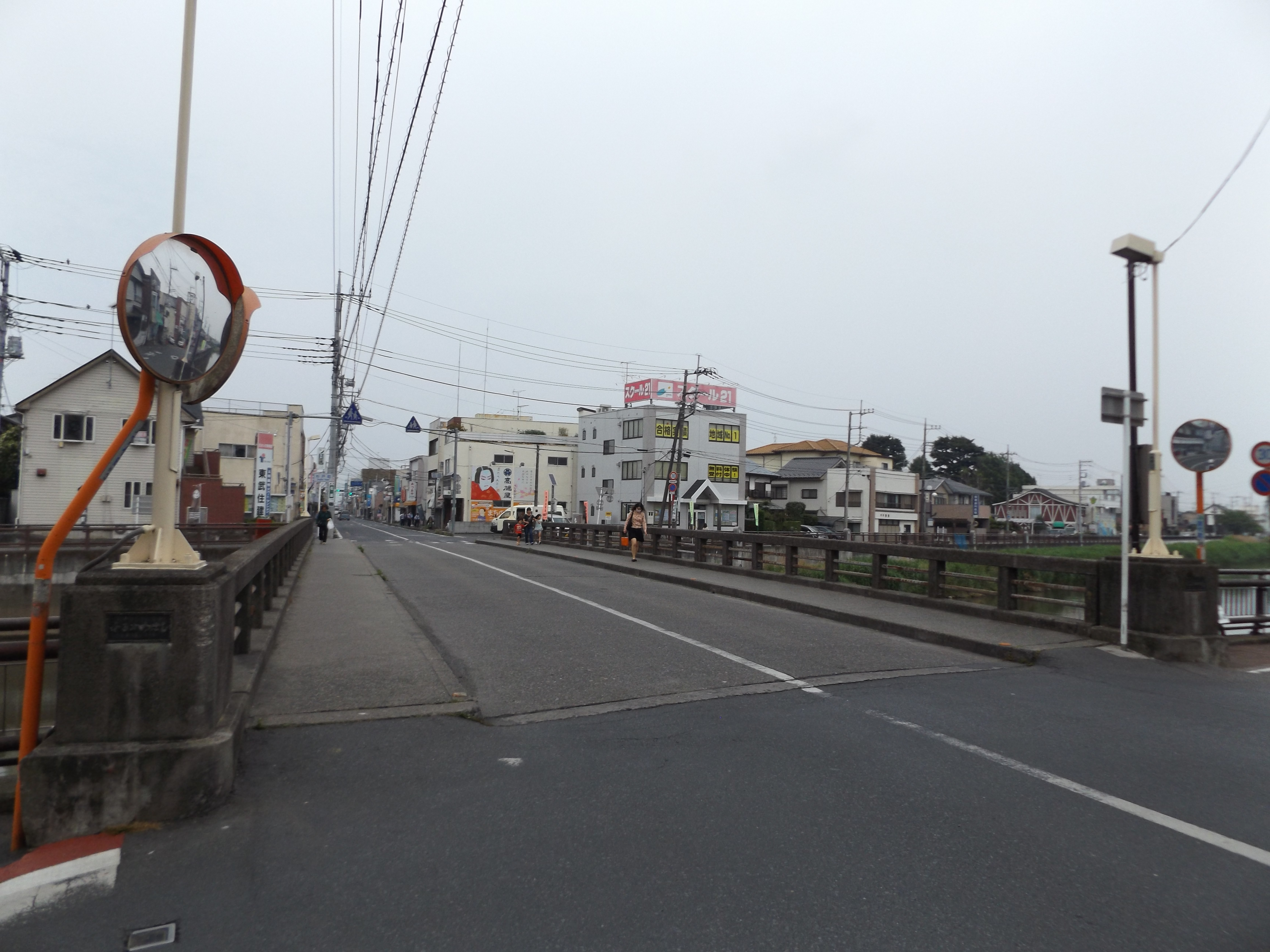 埼玉県道408号東武動物公園停車場線の古川橋。 大落古利根川に架かっており、左岸は北葛飾郡杉戸町、右岸は南埼玉郡宮代町。